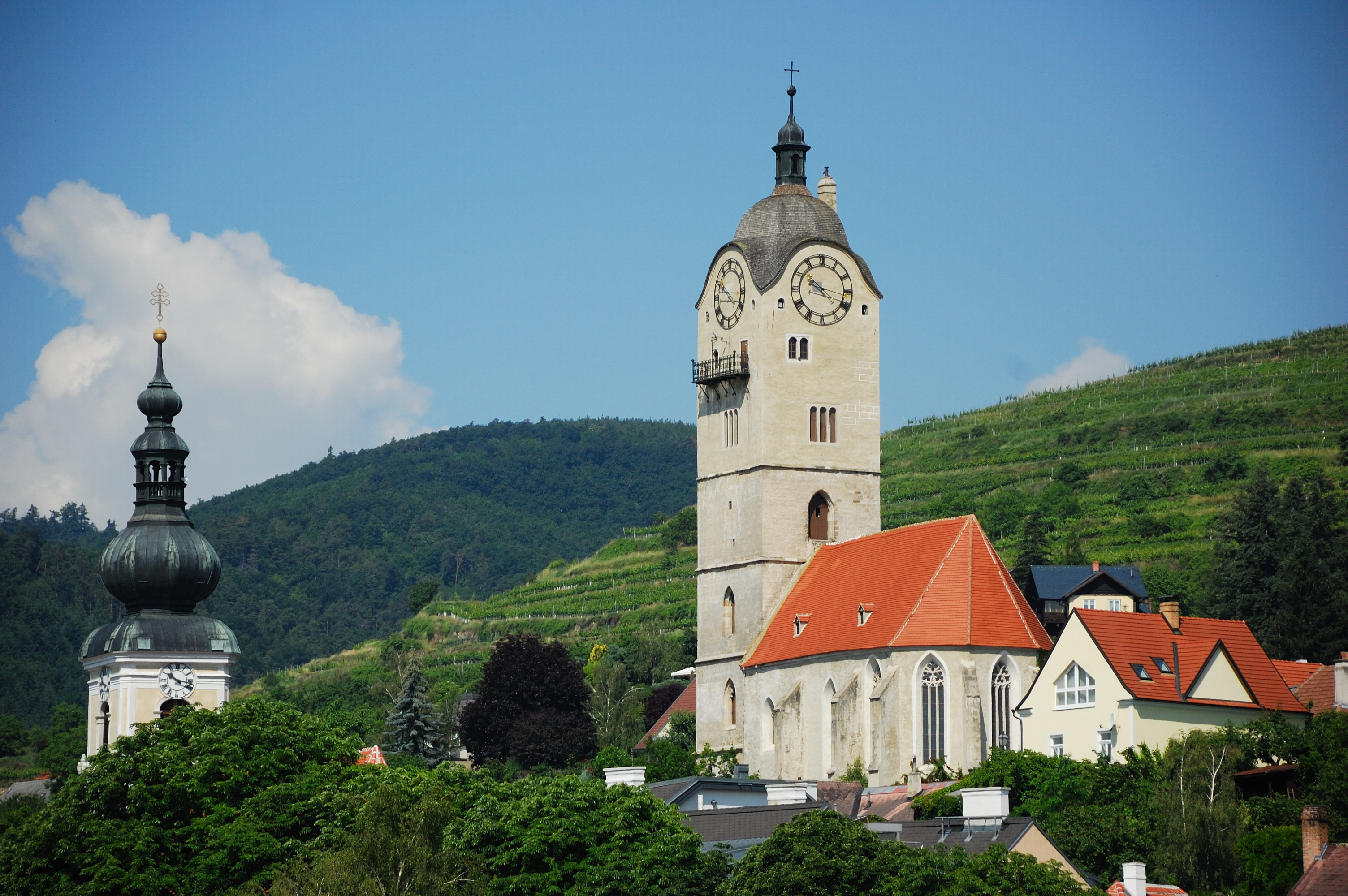 Frauenbergkirche in Stein, Krems, Niederösterreich